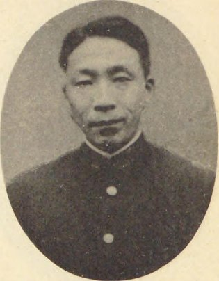 長崎惣之助